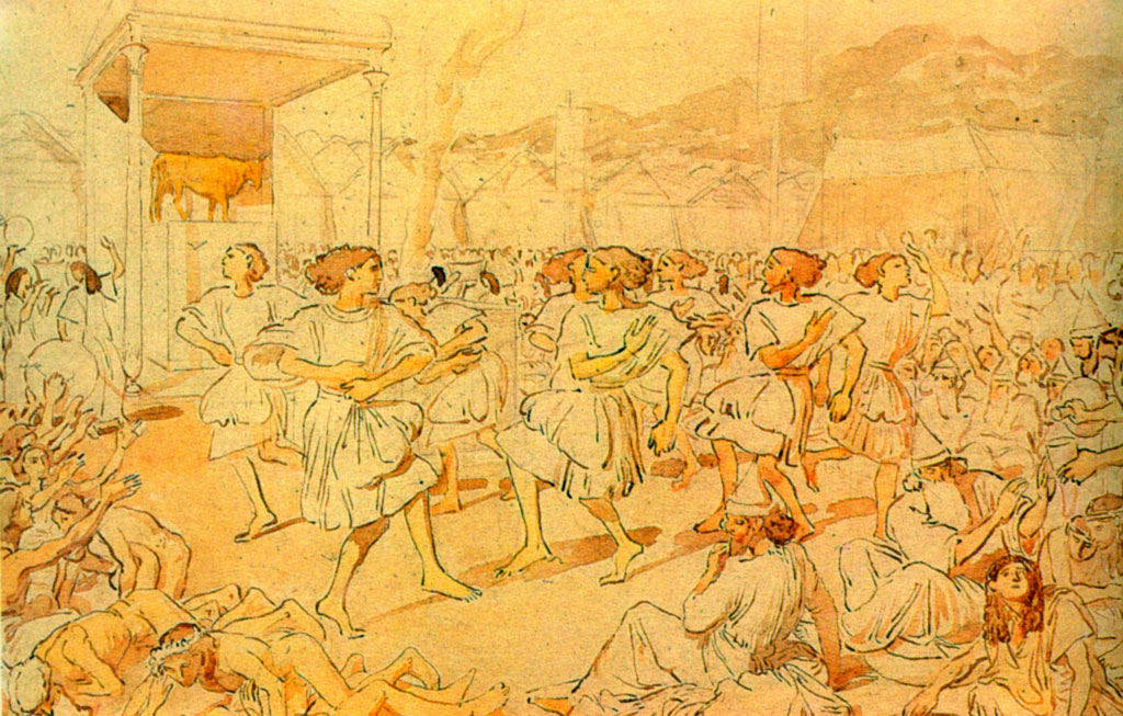 А. Иванов. Пляска перед золотым тельцом